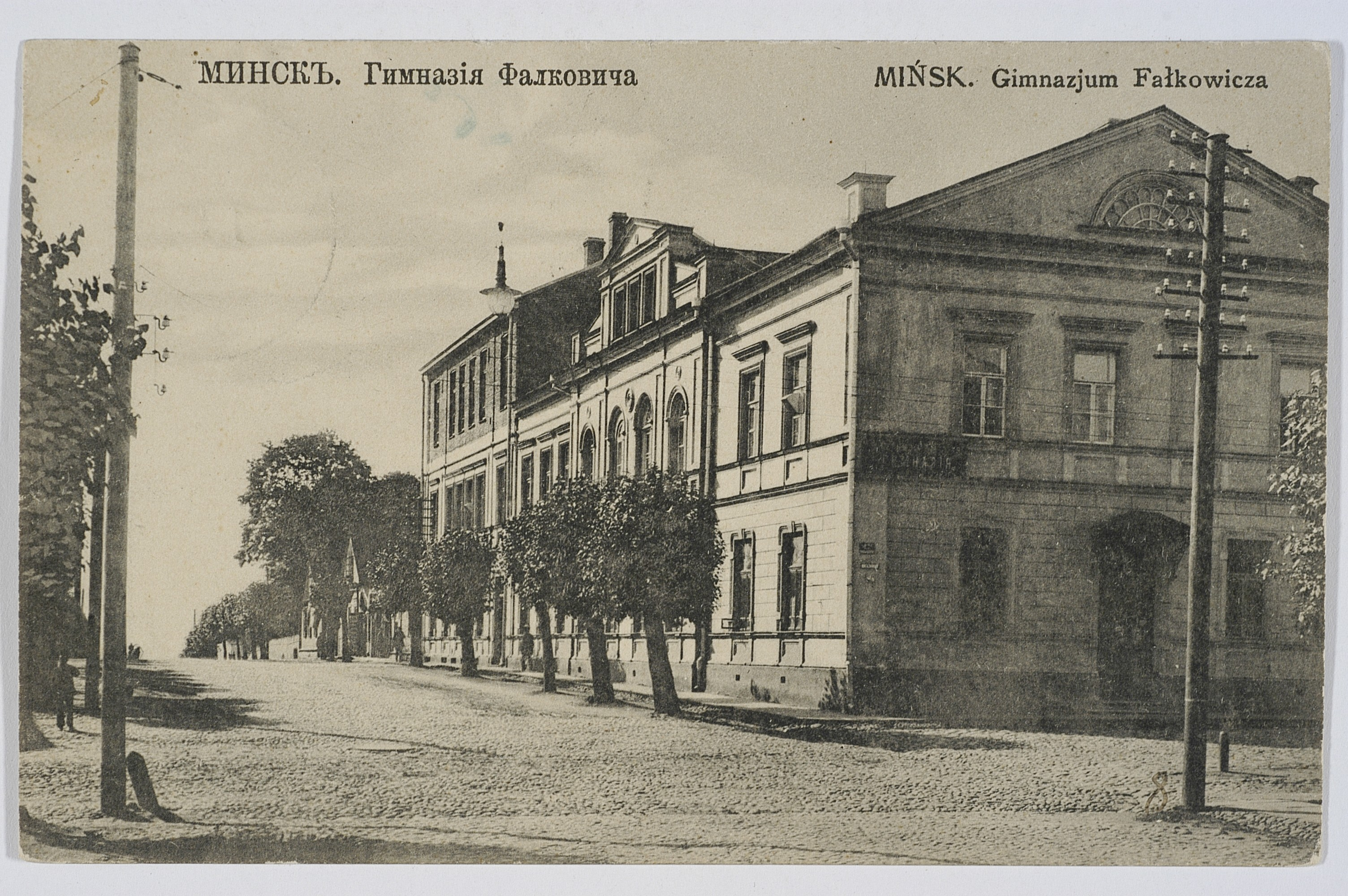 Беларуская (тарашкевіца): Менск (Miensk), рог вуліц Кашарскай (vulica Kašarskaja) і Магазыннай (vulica Magazynnaja). Гімназія Фальковіча